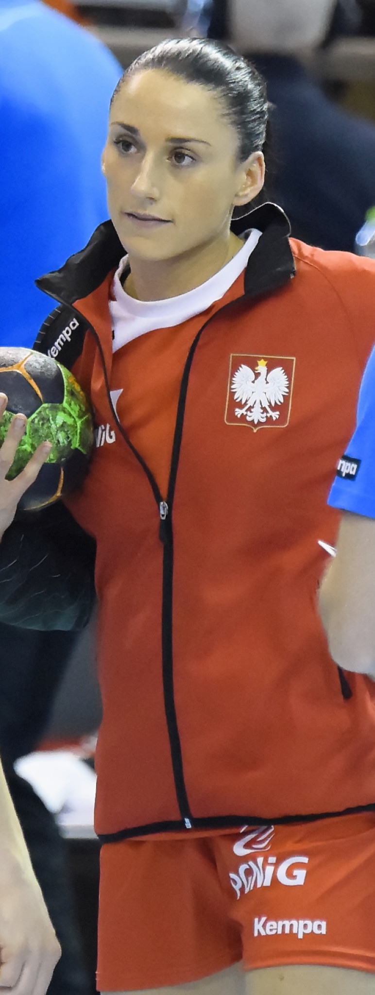 Rencontre en la Pologne et la norvège lors de la golden League de handball. A Dijon, le 19 mars 2015.